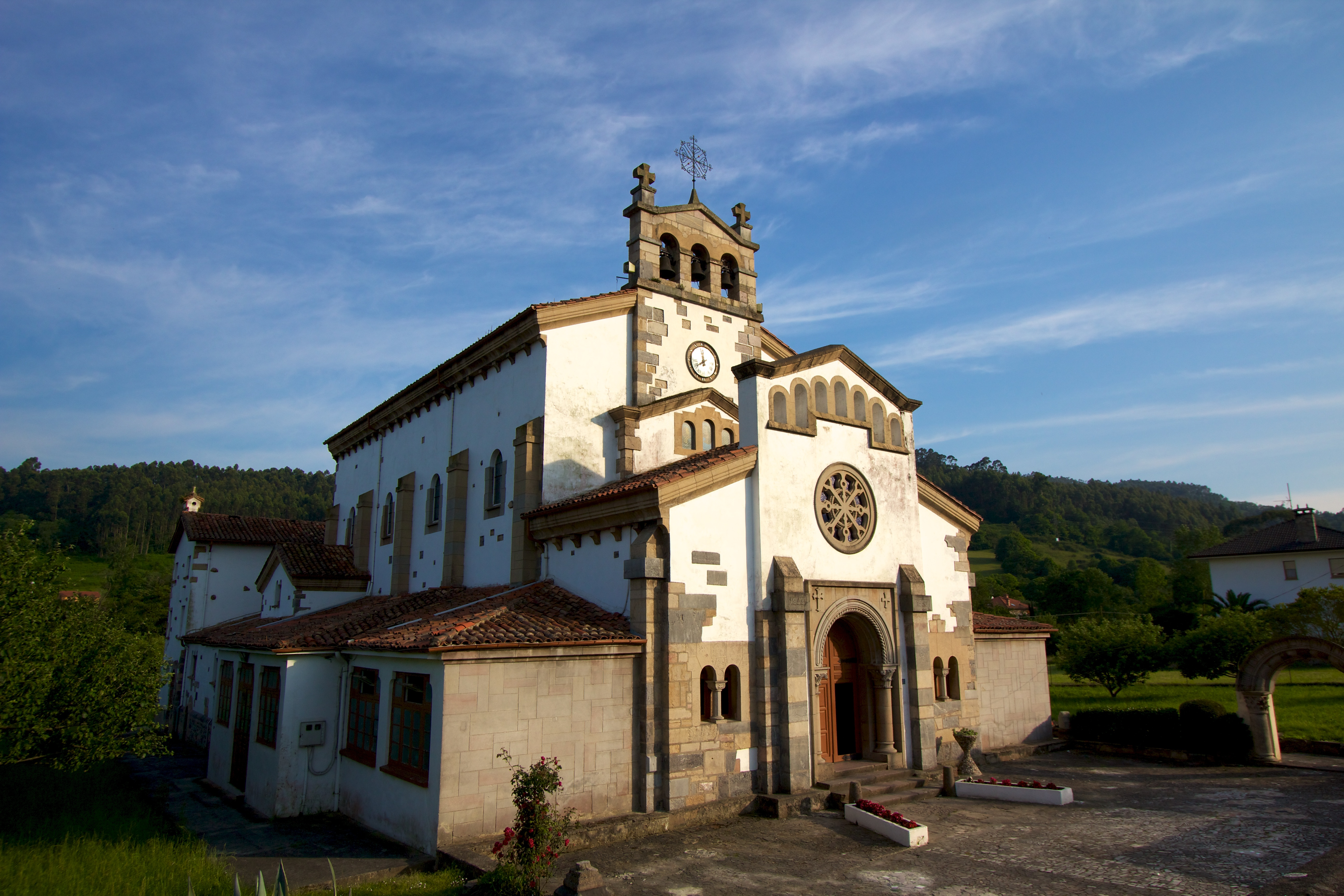 Iglesia de San Cipriano de Pillarno, concejo de Castrillón en Asturias, España.